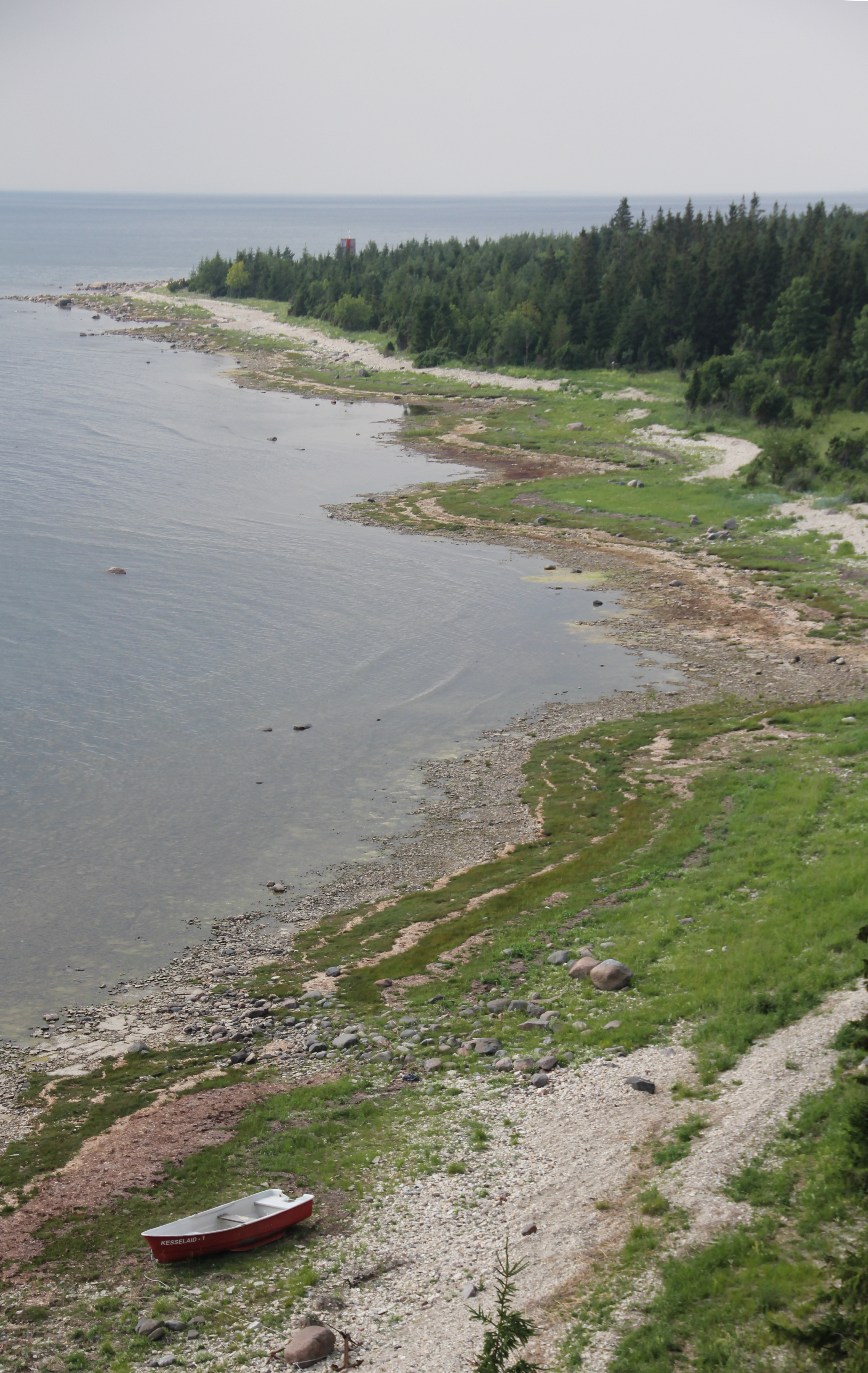 Kesselaiu rand võib maapinnalt tunduda nagu iga teine; hoopis teise nurga alt vaadates saad aru, et tegemist on vägagi erilise kohaga.